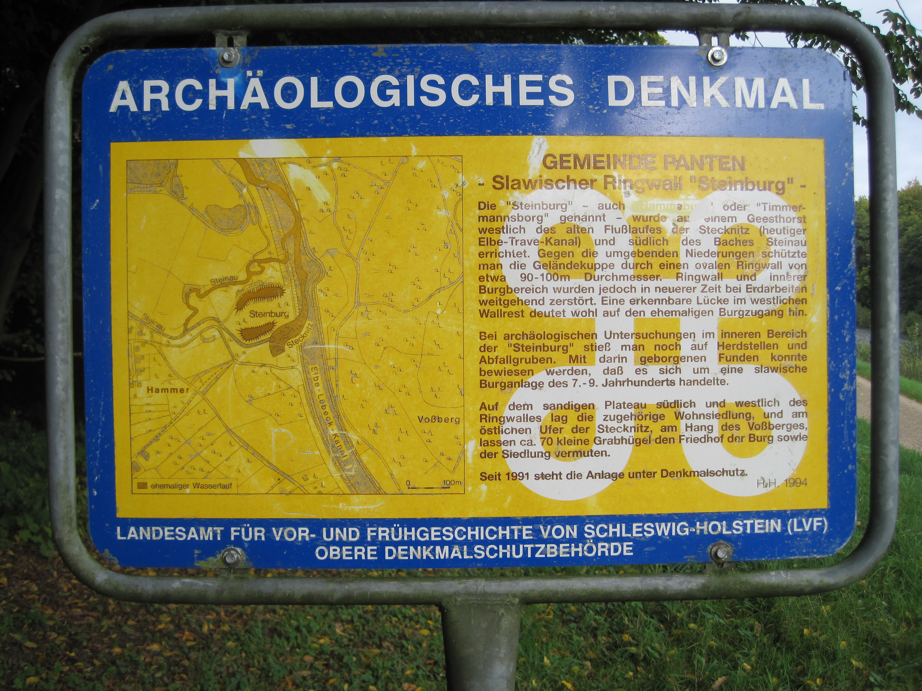 Hinweisschild am Radwanderweg des Elbe-Lübeck-Kanals auf die Steensburg (bei Hammer in der Gemeinde Panten) als Kulturdenkmal.